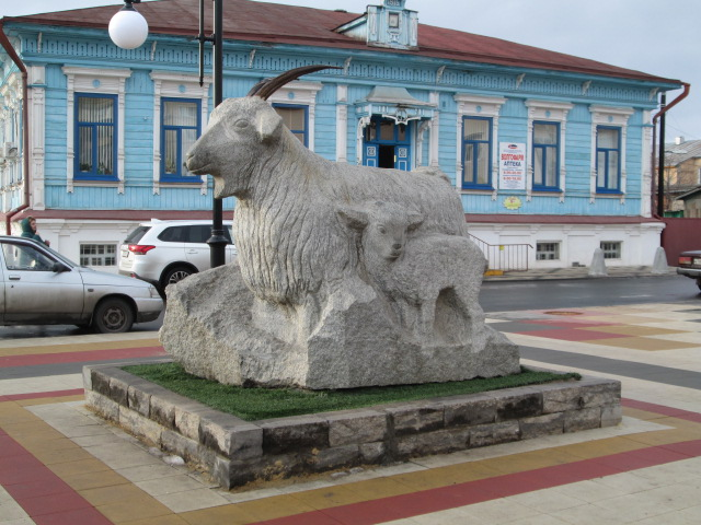 Памятник козе, Урюпинск, Волгоградская область